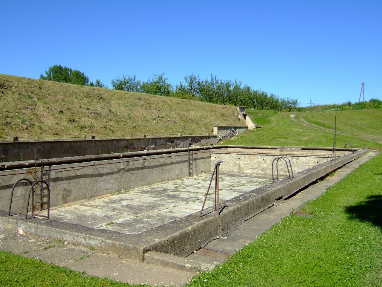 Schwimmbad für die Mitglieder und Angehörigen der SS in der Kleinen Festung in Theresienstadt